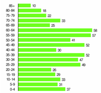 Добърско - население по възраст